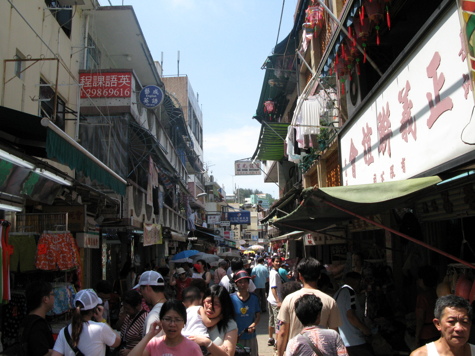 Cheung Chau San Hing Street